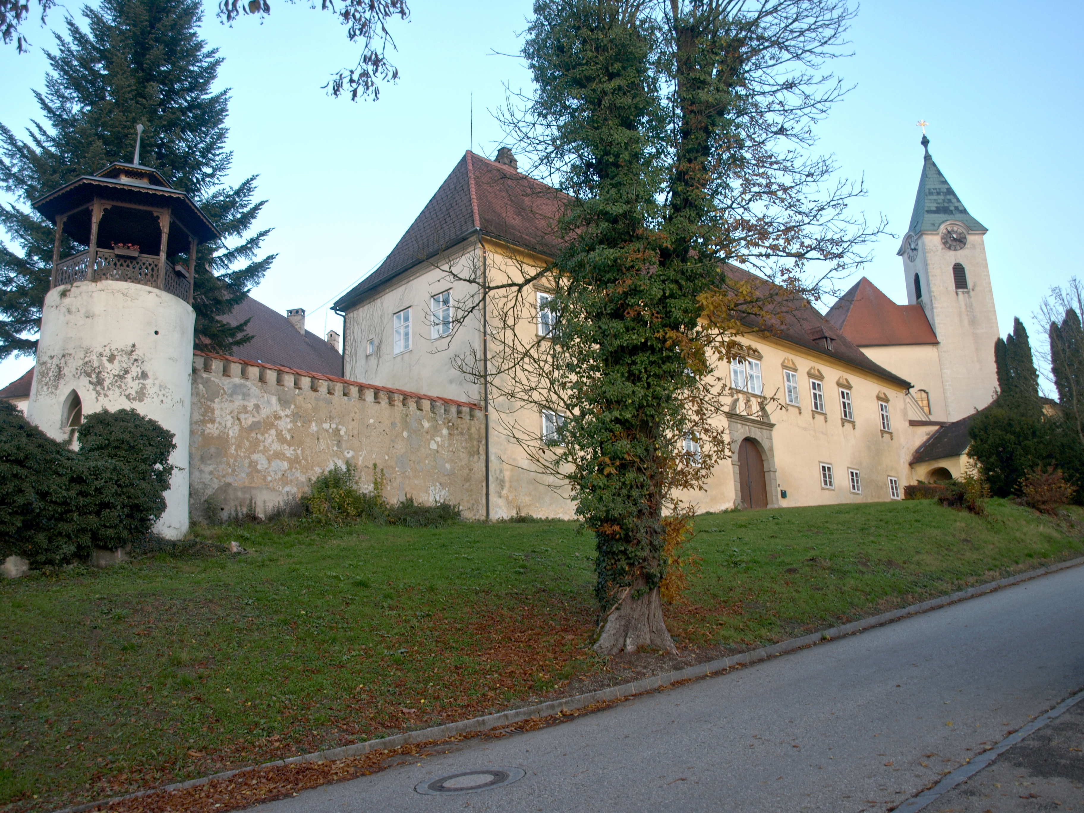 Ehem. Stift, heute Schloss